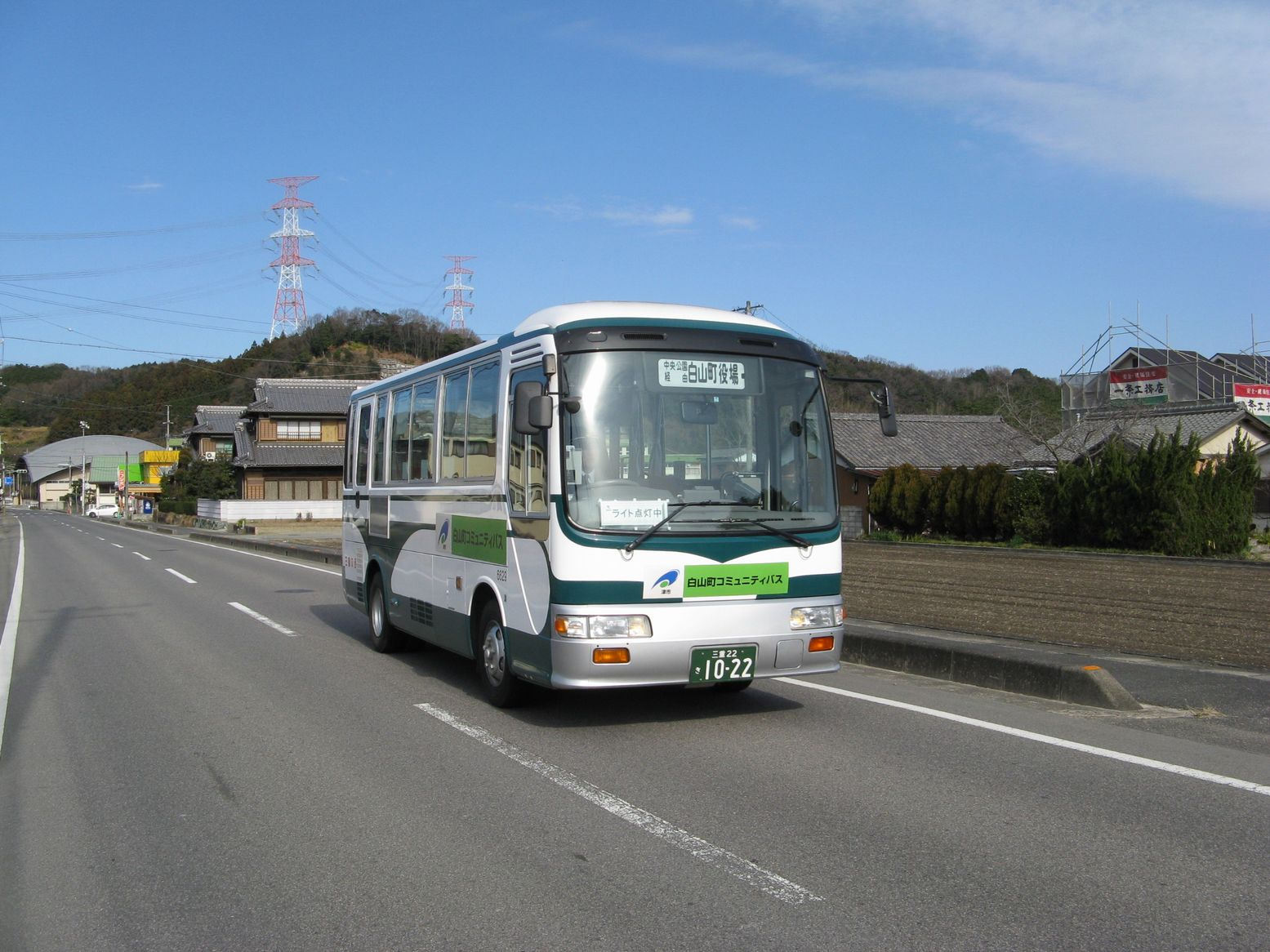 白山中学校南方を走行するja:白山町コミュニティバス